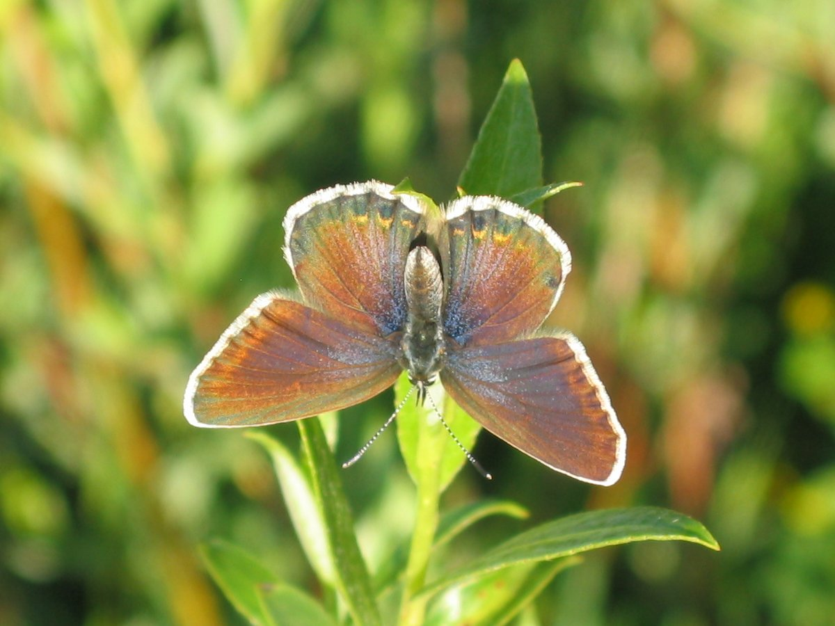 Lycaeidas idas